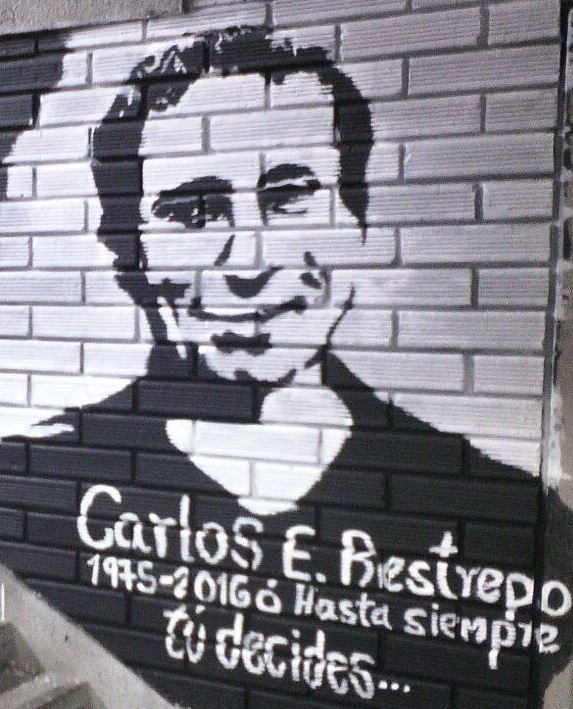 Foto del mural realizado por estudiantes y amigos del profesor después de su muerte.